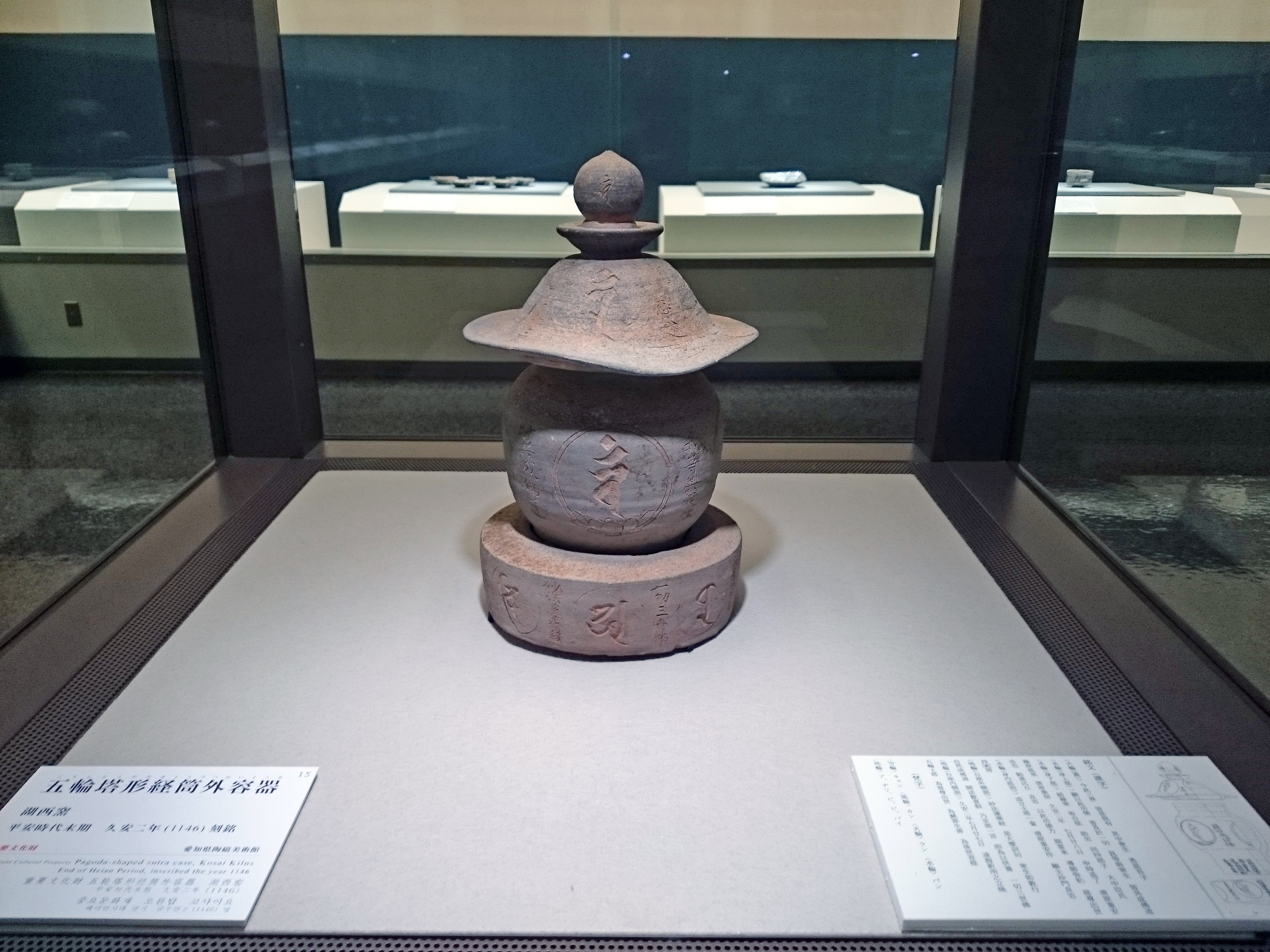 湖西窯跡群（静岡県湖西市）産の久安2年（1146年）銘・陶製五輪塔（愛知県陶磁美術館蔵）